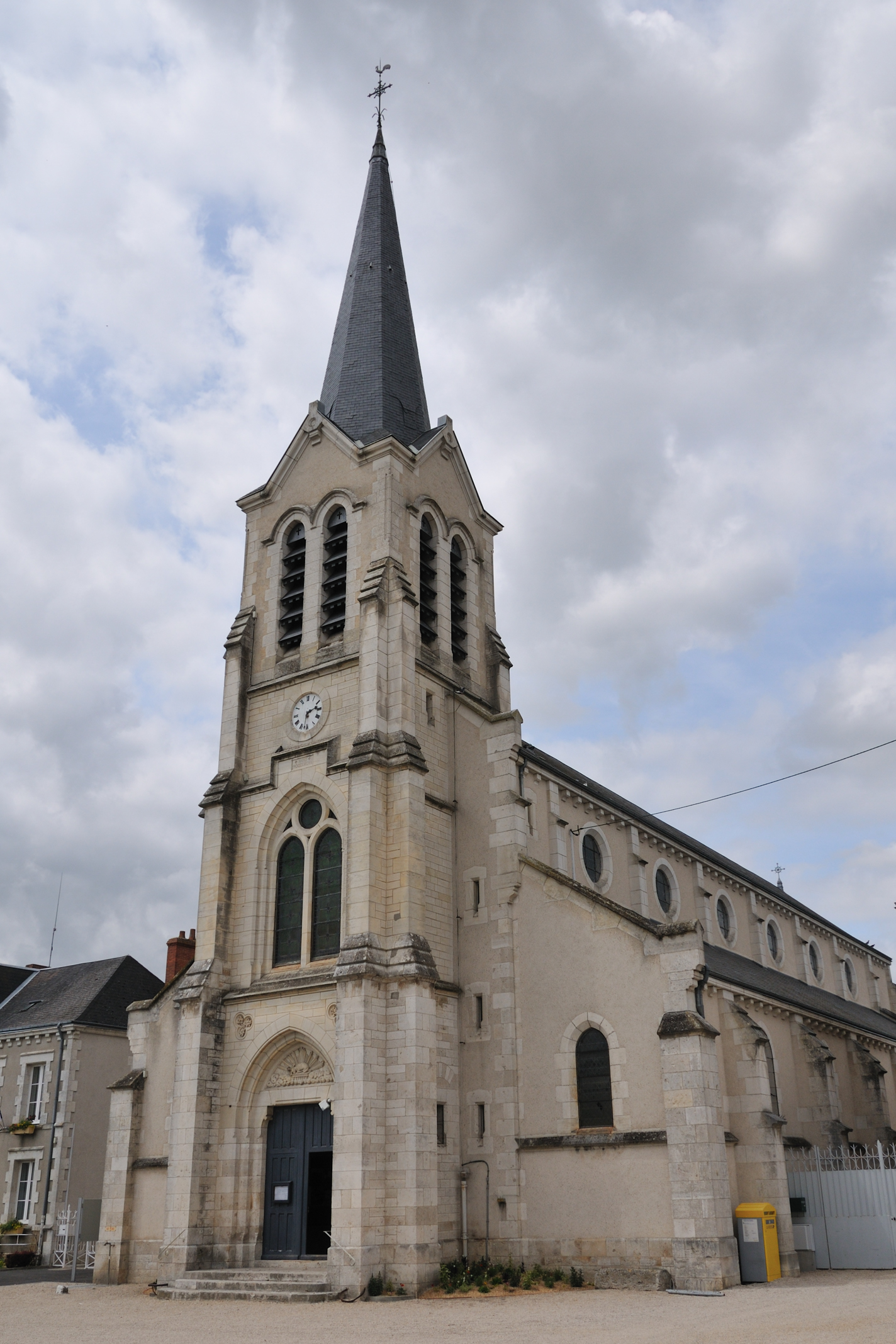 Église Saint-Symphorien, Chaingy, Loiret, France